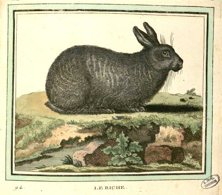 Lapin riche représenté par le comte Georges Louis Leclerc de Buffon en 1754.